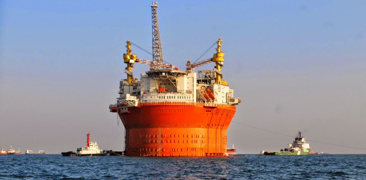 Dette er det opprinnelige bildet til Goliatfeltet på Wiki NB. Som fotograf ble jeg sjøsjuk av å se at bildet står på snei i artikkelen. Derfor har jeg kun rettet opp på bildet, slik det ser mye penere ut.